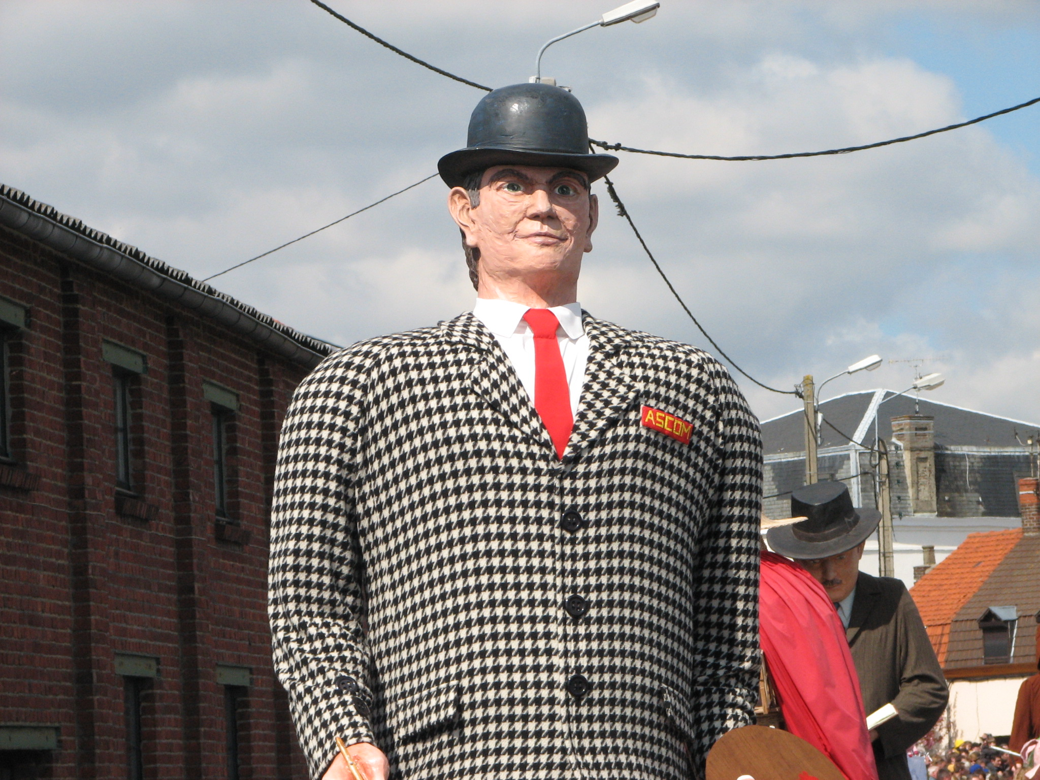 René Magritte-Géant de Lessines Photo personnelle 2005 Pas de copyright